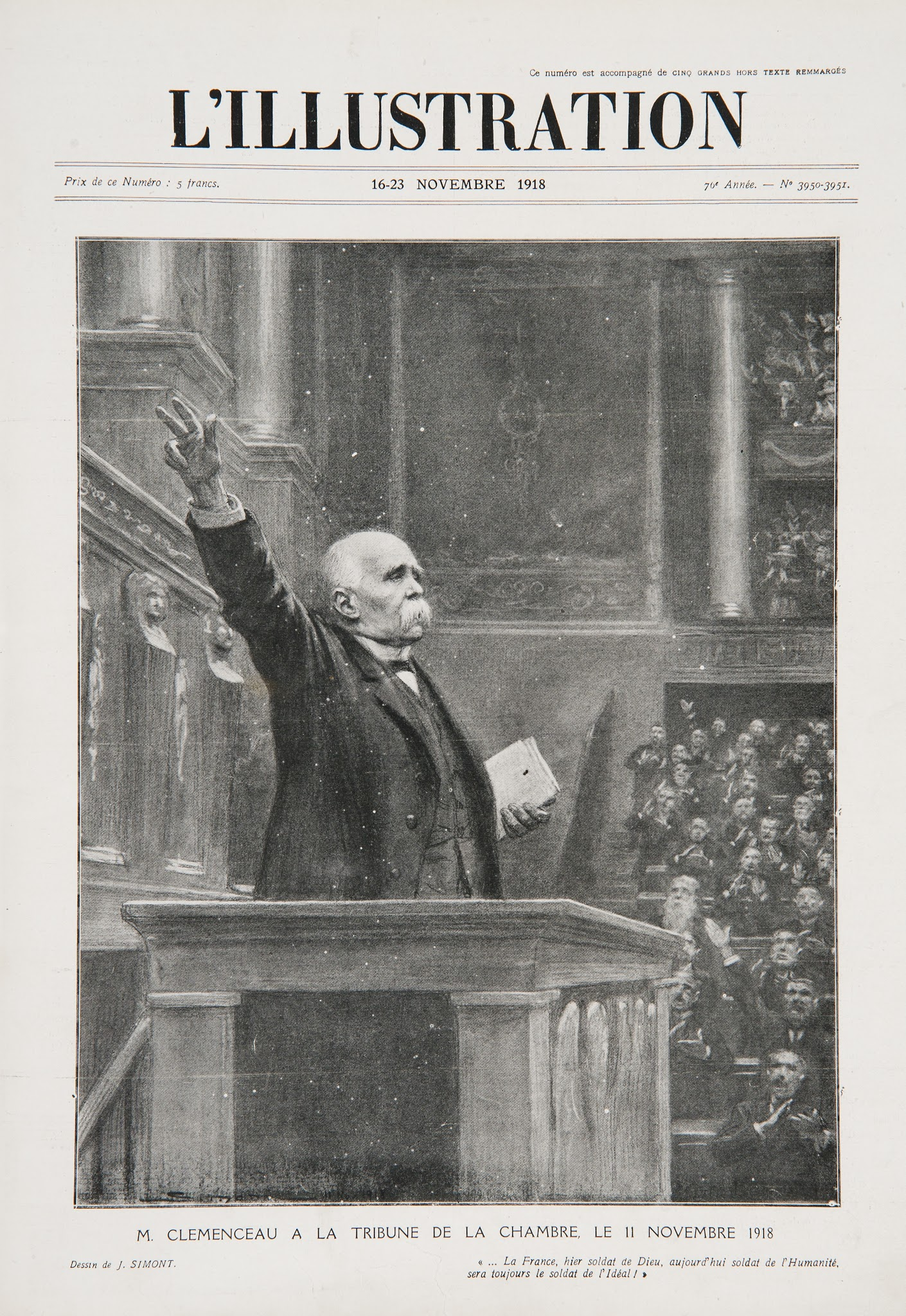 L'Illustration : Clemenceau à la tribune de la Chambres des députés le 11 novembre 1918.